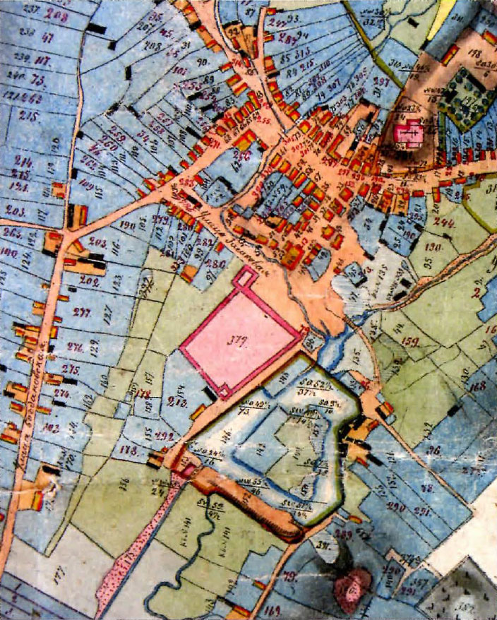 Беларуская (тарашкевіца): Крэва (Kreva)